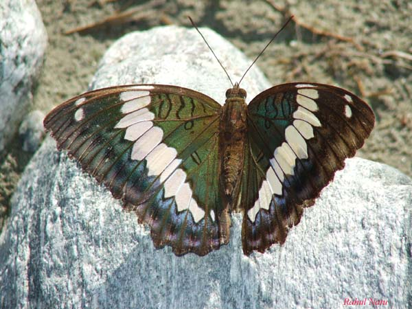 Rahul Natu